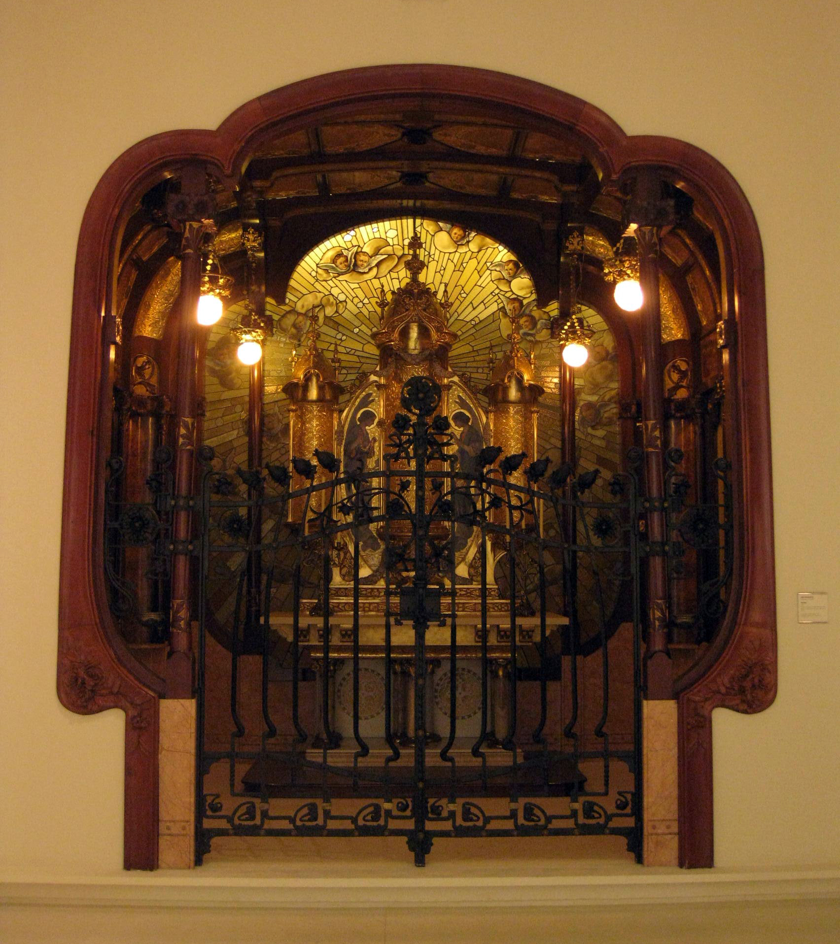 Palau Nacional (Barcelona)